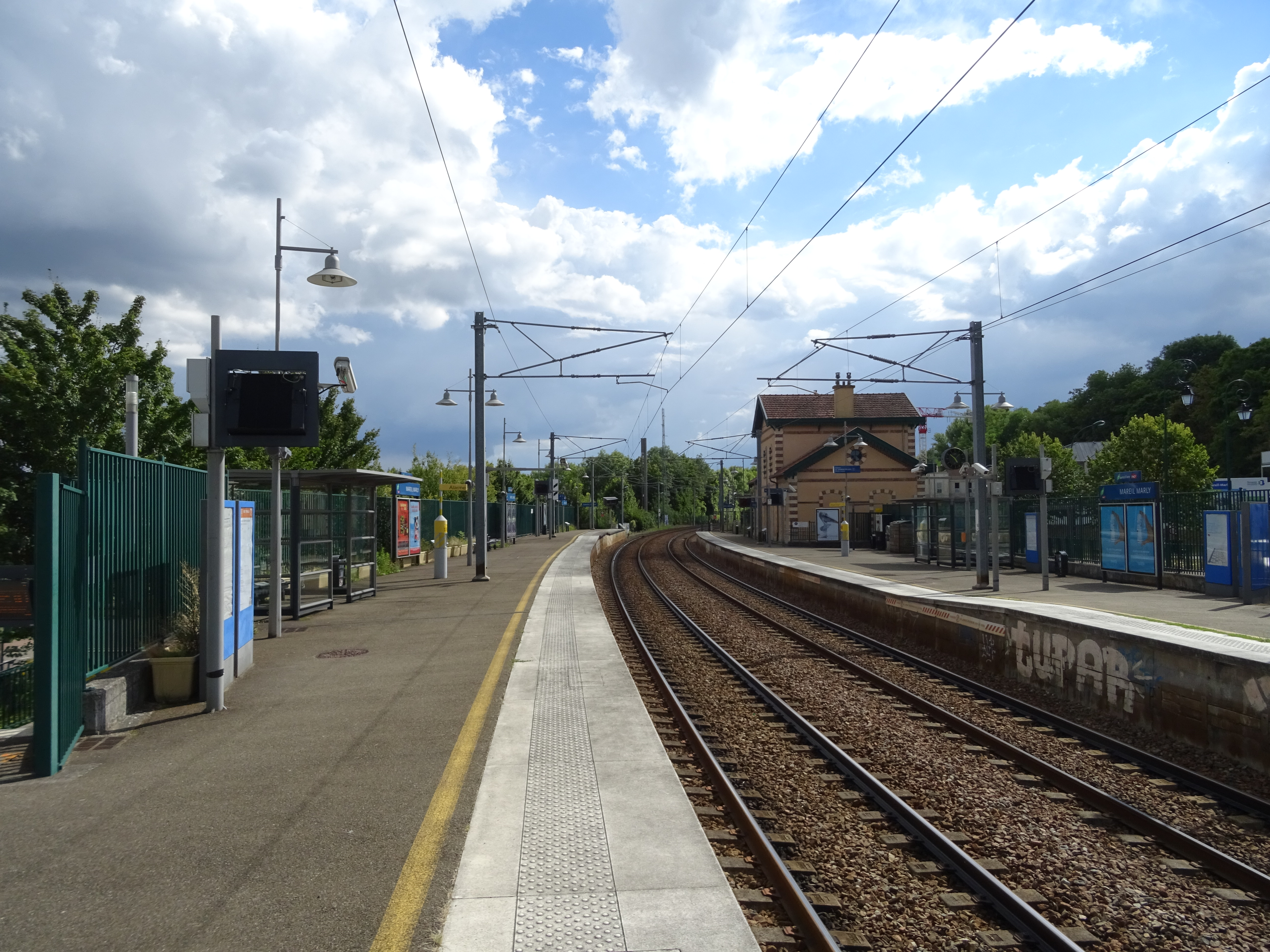 Voies de la gare de Mareil-Marly